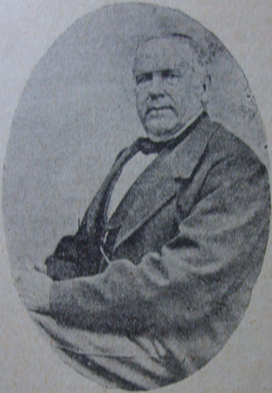 Francisco Morales Van den Eyden, pintor poblano del siglo XIX